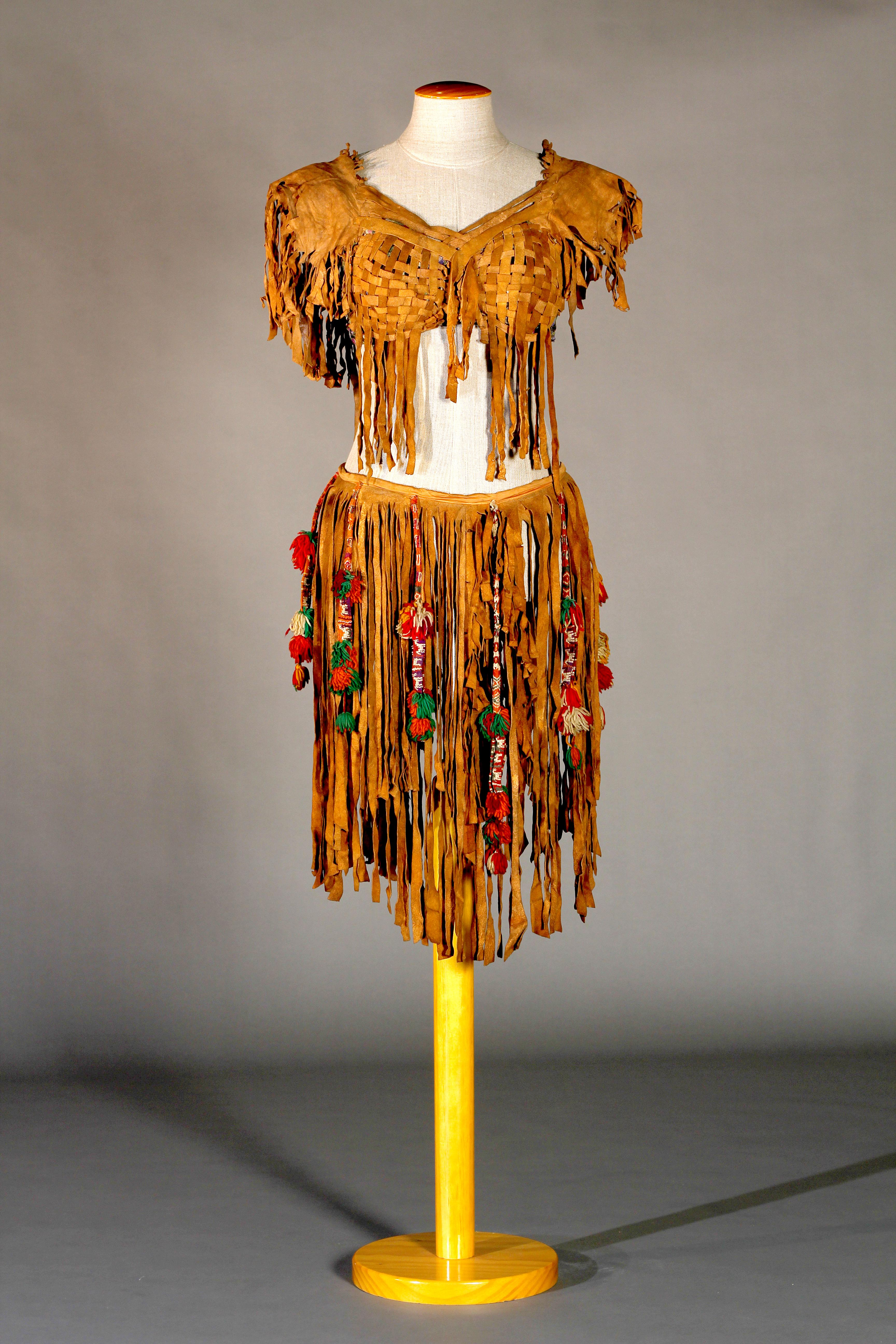 Corpiño y falda de Tórtola Valencia en la Danza Africana (s. XX). Confeccionado a partir de tiras entrelaadas y flequillos.